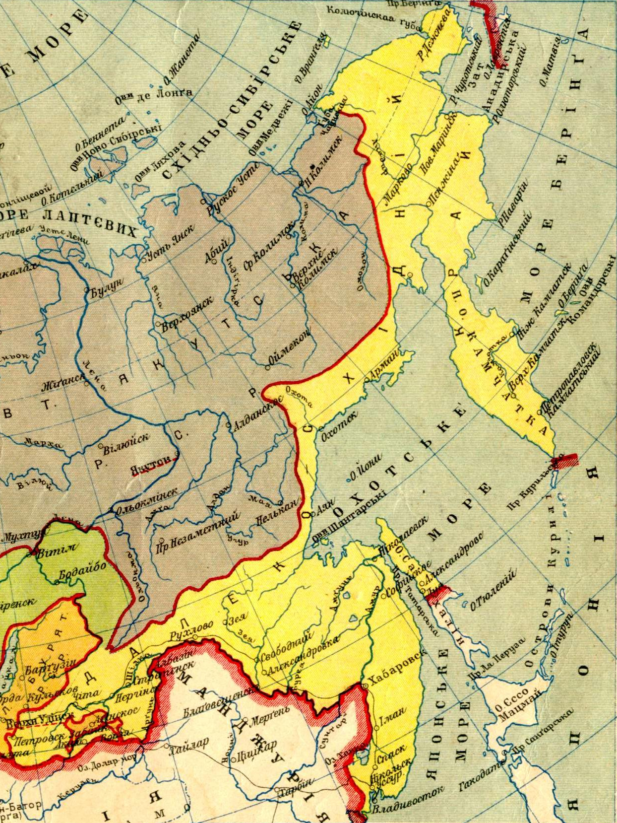 фрагмент карты азиатской части СССР